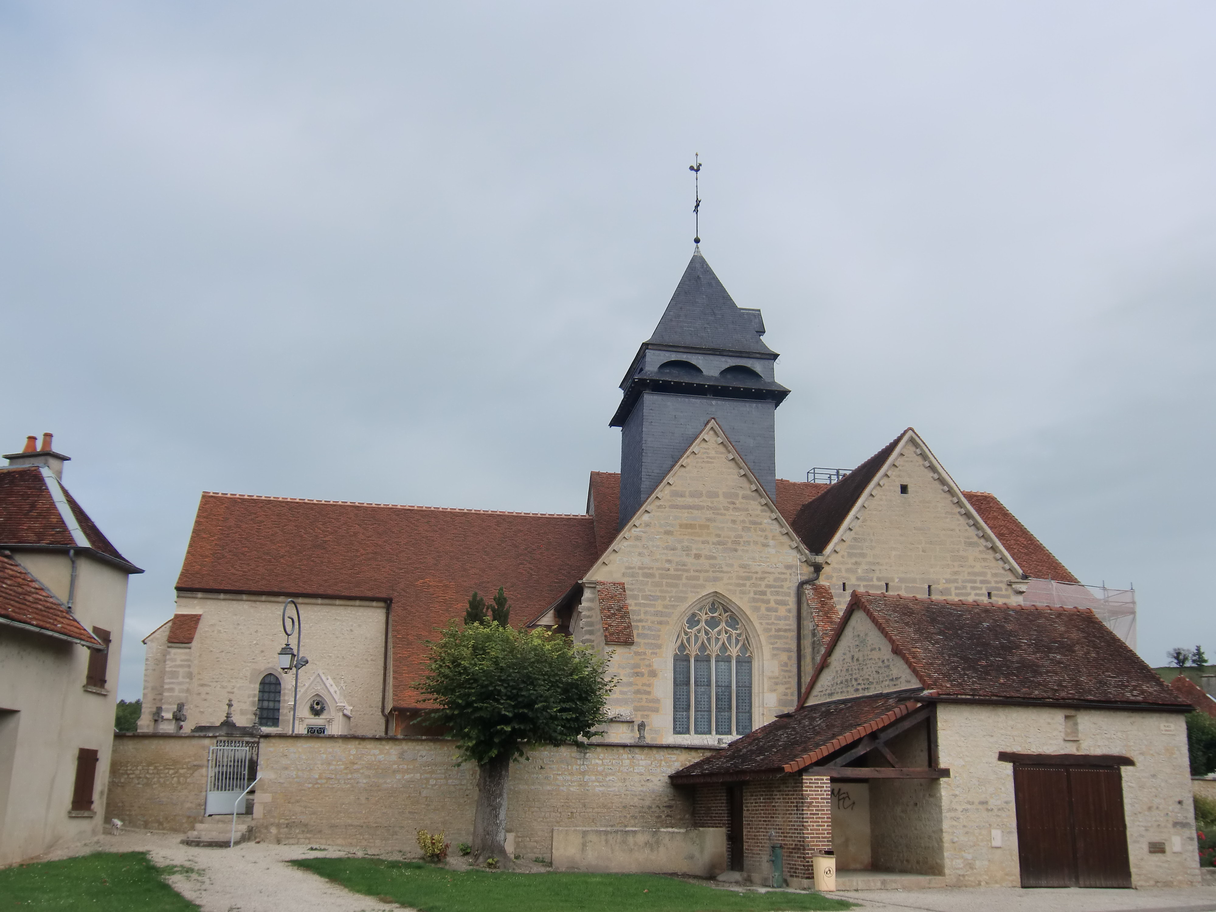 Eglise de Bourguignons (Aube - Champagne - France)